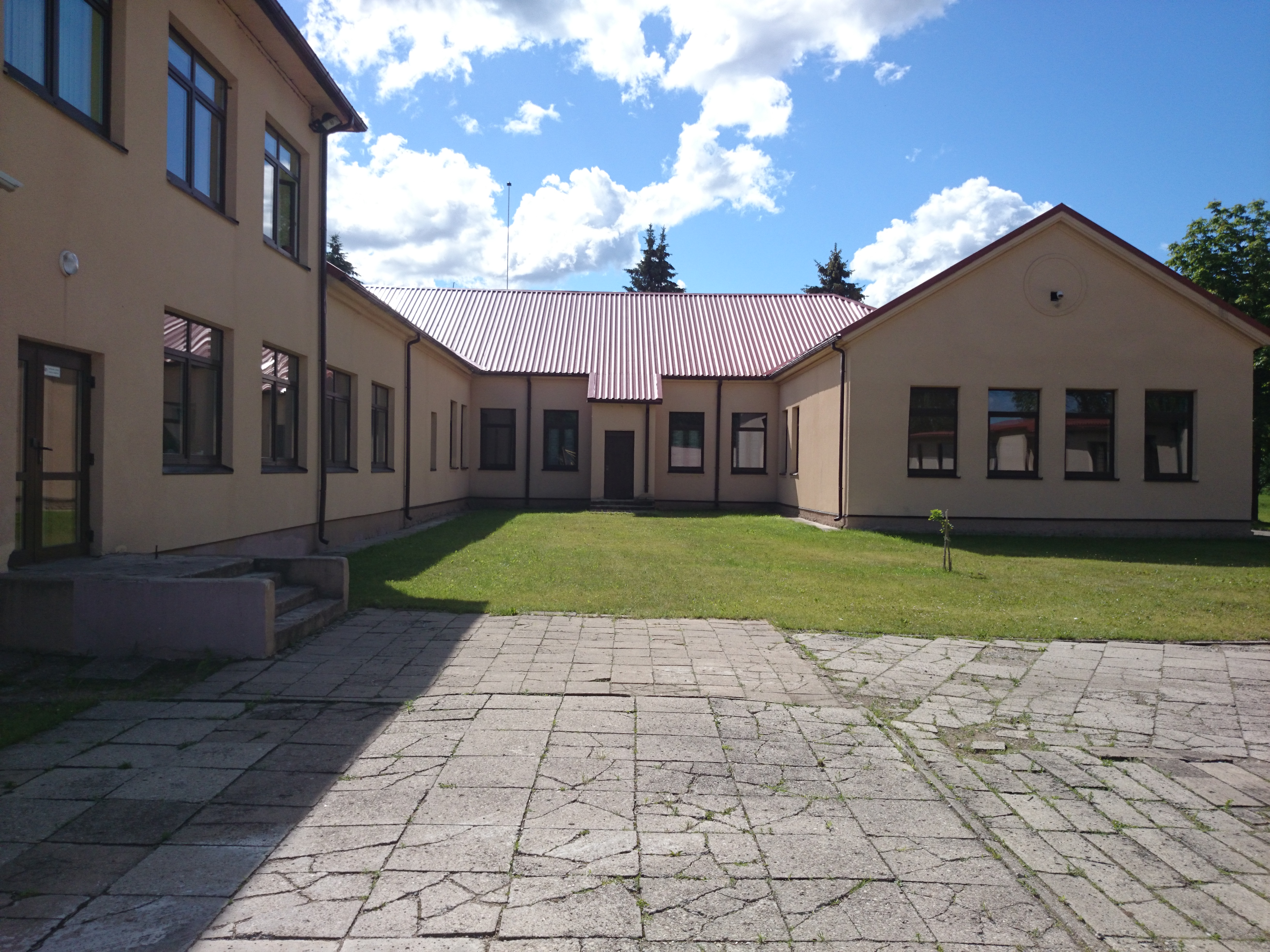 Lietavos pagrindinė mokykla